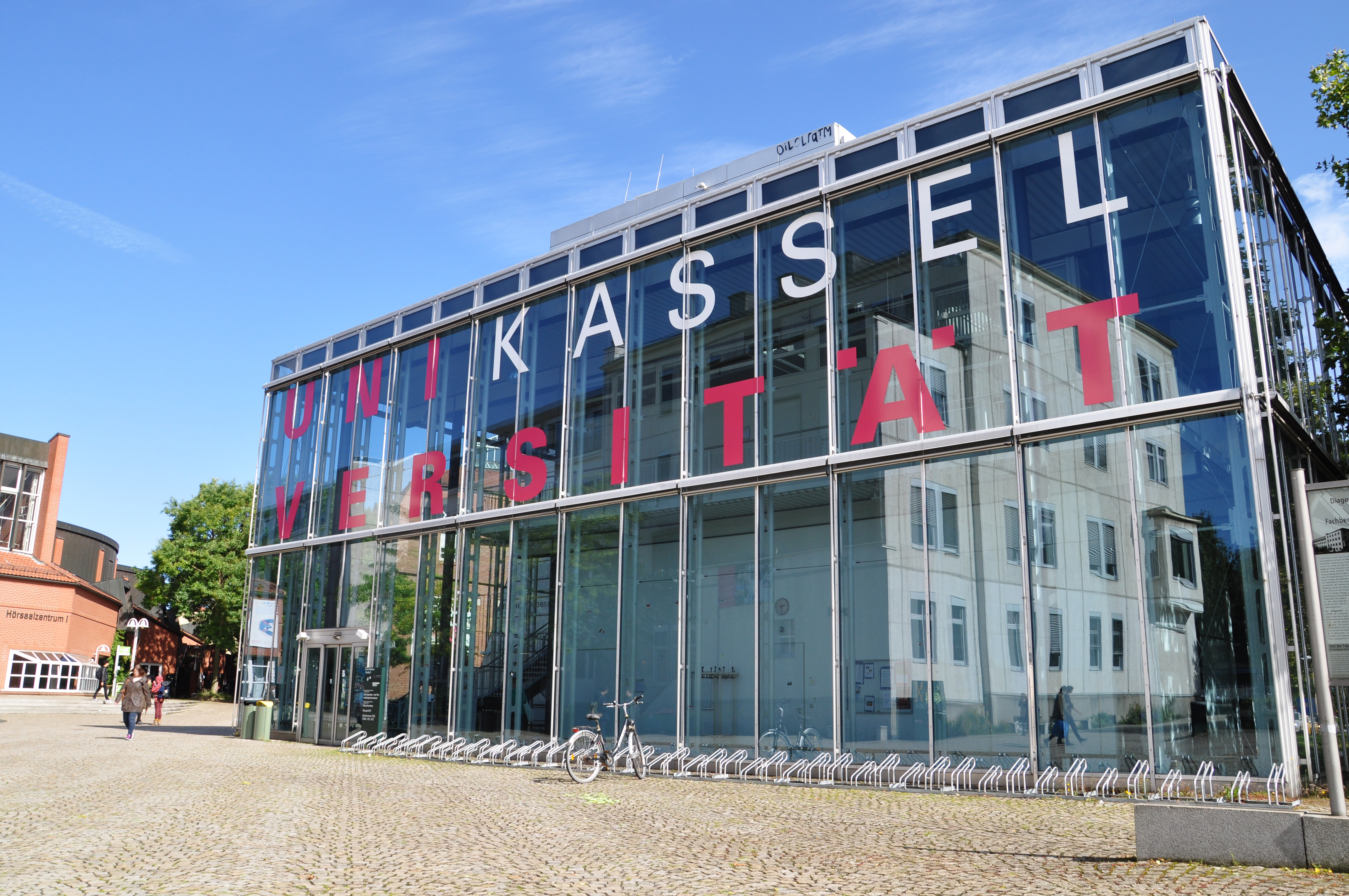 Großflächige Darstellung des Logos der Uni Kassel am Gebäude Ingenieurwissenschaften.